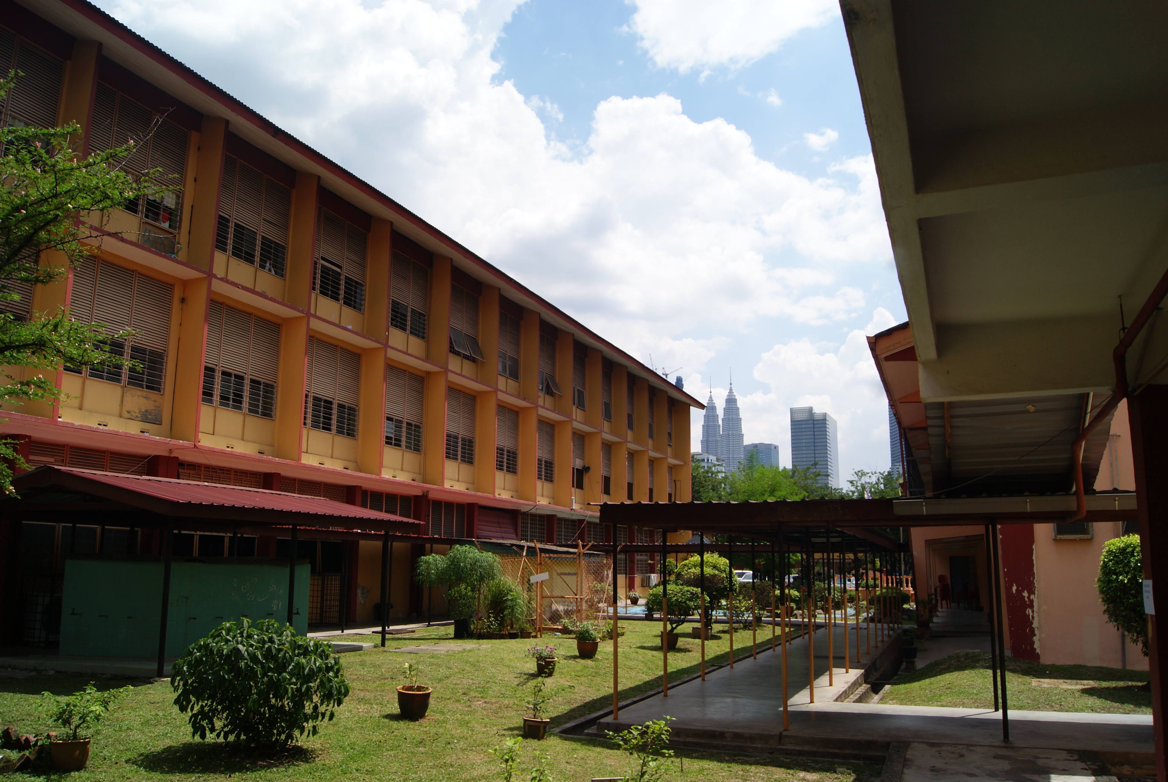 school scenery